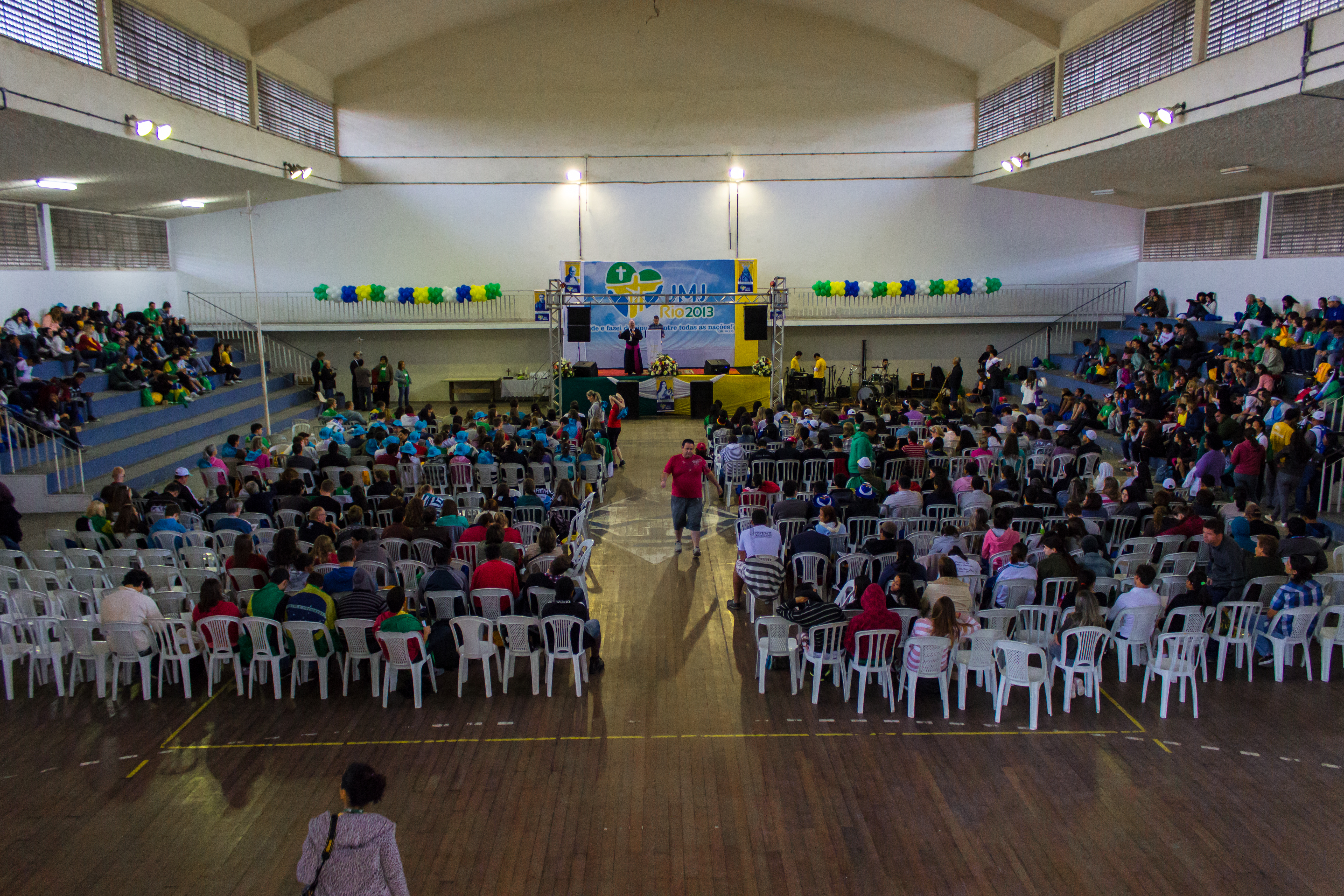 Catequese em Português, realizada durante a Jornada Mundial da Juventude